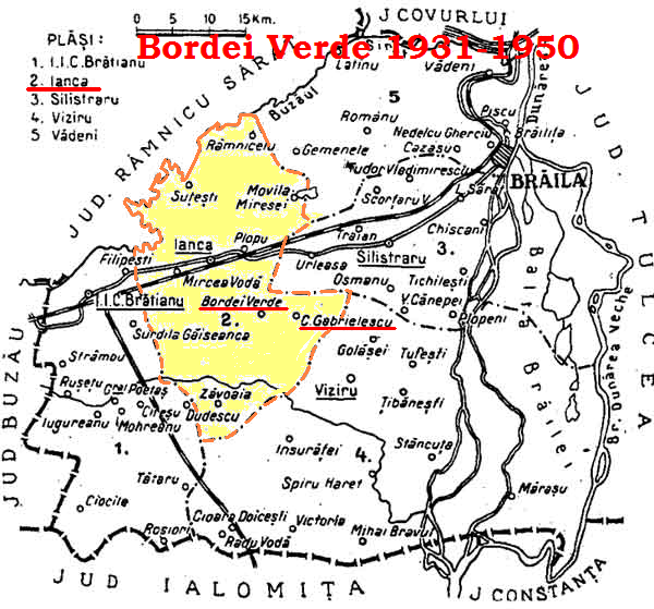 Map of the Bordei Verde village from Brăila County, Romania, between 1931-1950Română: Harta situării comunei Bordei Verde, în cadrul Plăşii Ianca în perioada 1931-1950